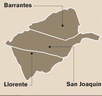 Mapa de los distritos del cantón de Flores, provincia de Heredia, Costa Rica.